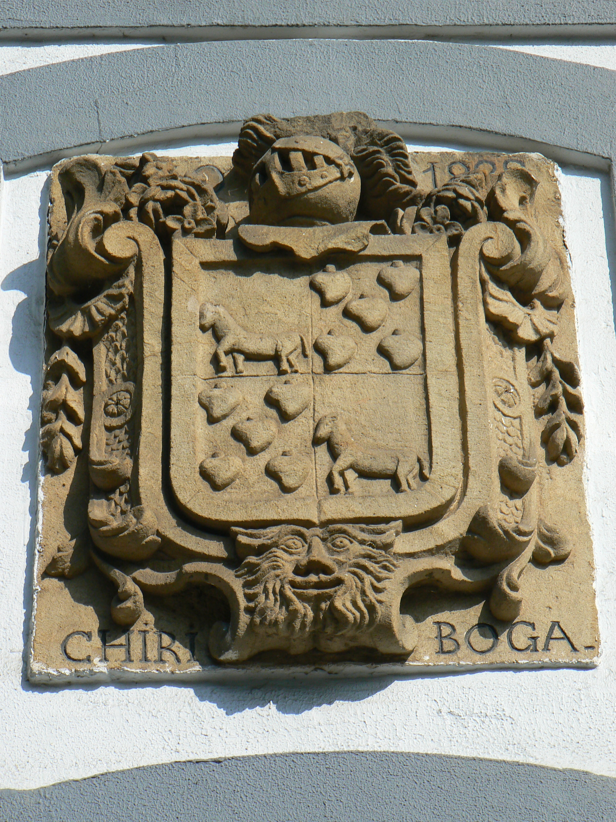 Pottokak Zestoako Txiriboga auzoko armarrian